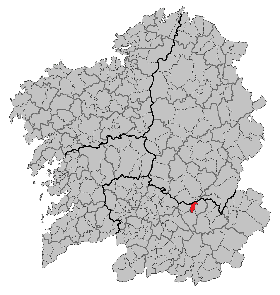 Mapa coa localización do concello da Teixeira.